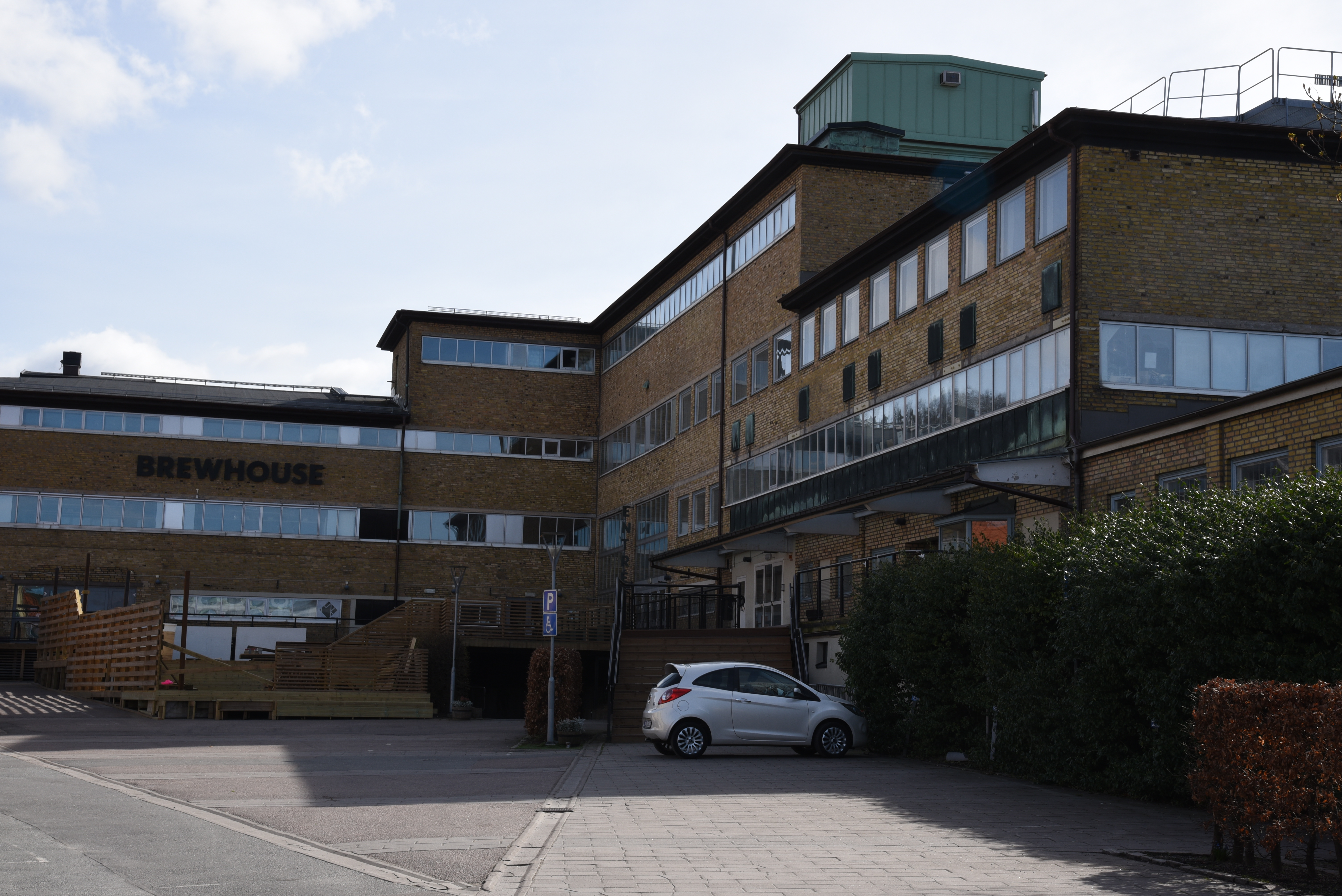 Brewhouse, ursprungligen Apotekarnes vattenfabrik, vid Åvägen 24 i stadsdelen Gårda i Göteborg. Byggnaden uppförd 1935-36. Göteborgs industrihistoriska museum och Göteborgs etnografiska museum inrymdes i lokalen under 1980- och 1990-talen.